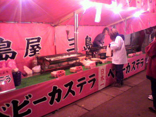 ベビーカステラの老舗 三島屋の移動式露天の全体図(約42mのお店)